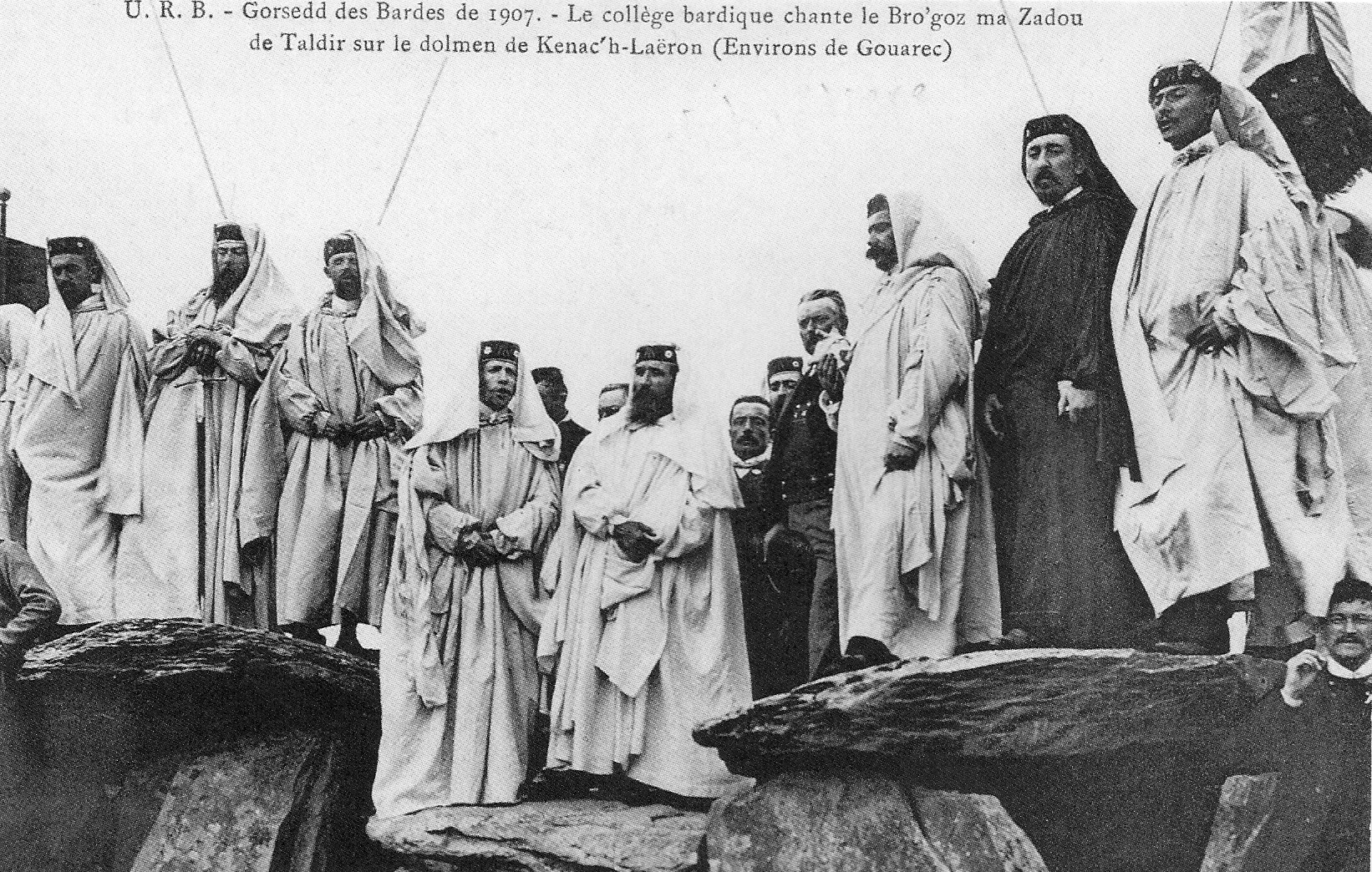 Environs de Gouarec : le Gorsedd des Bardes de 1907 (le collège bardique chante le Bro goz ma Zadou de Taldir sur le domen de Canac'h-Laëron, limite Laniscat-Saint-Nicolas-du-Pélem).